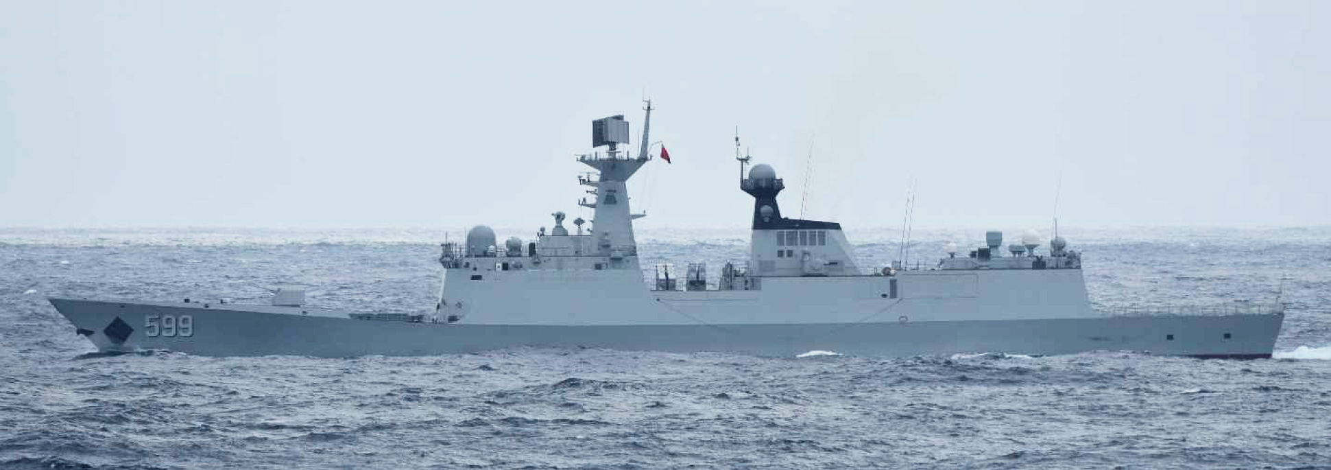 ４月５日（金）午後５時頃、海上自衛隊第１海上補給隊所属「はまな」（佐世 保）及び第１２護衛隊所属「うみぎり」（呉）が、宮古島の北東約１００ｋｍの 海域を南東進する中国海軍ルーヤンⅡ級ミサイル駆逐艦１隻、ジャンカイⅡ級 フリゲート１隻及びフチ級補給艦１隻の合計３隻を確認した。 その後、これらの艦艇が沖縄本島と宮古島の間の海域を南東進し、太平洋へ向 けて航行したことを確認した。